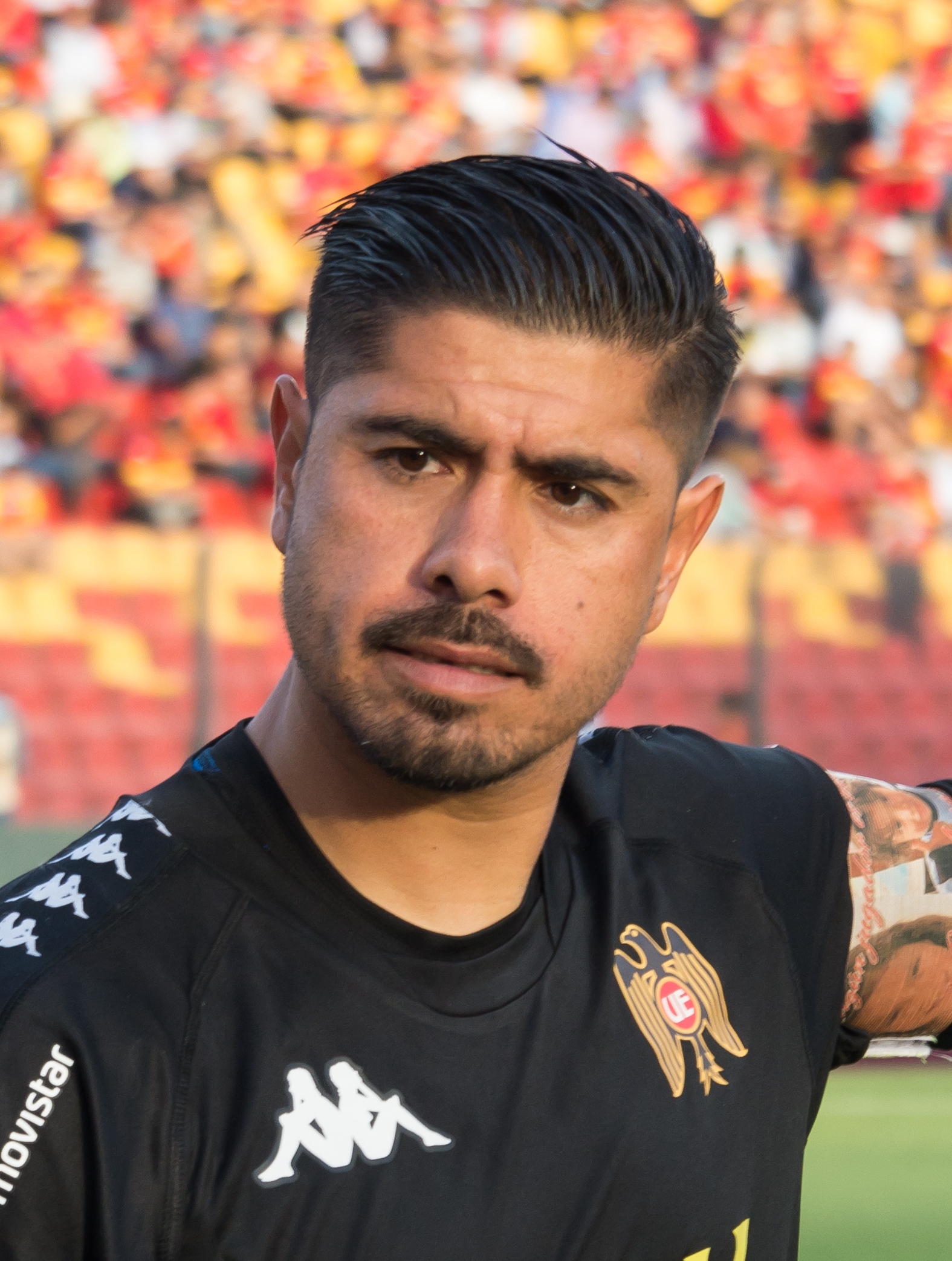 Diego Sánchez Carvajal, Unión Española v Mushuc Runa, Estadio Santa Laura, Independencia, Santiago, Región Metropolitana, Chile.